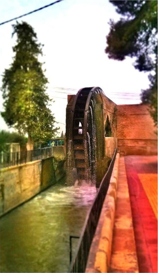 Monumento BIC del Siglo XV que incluye noria y acueducto